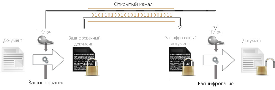 Общая схема